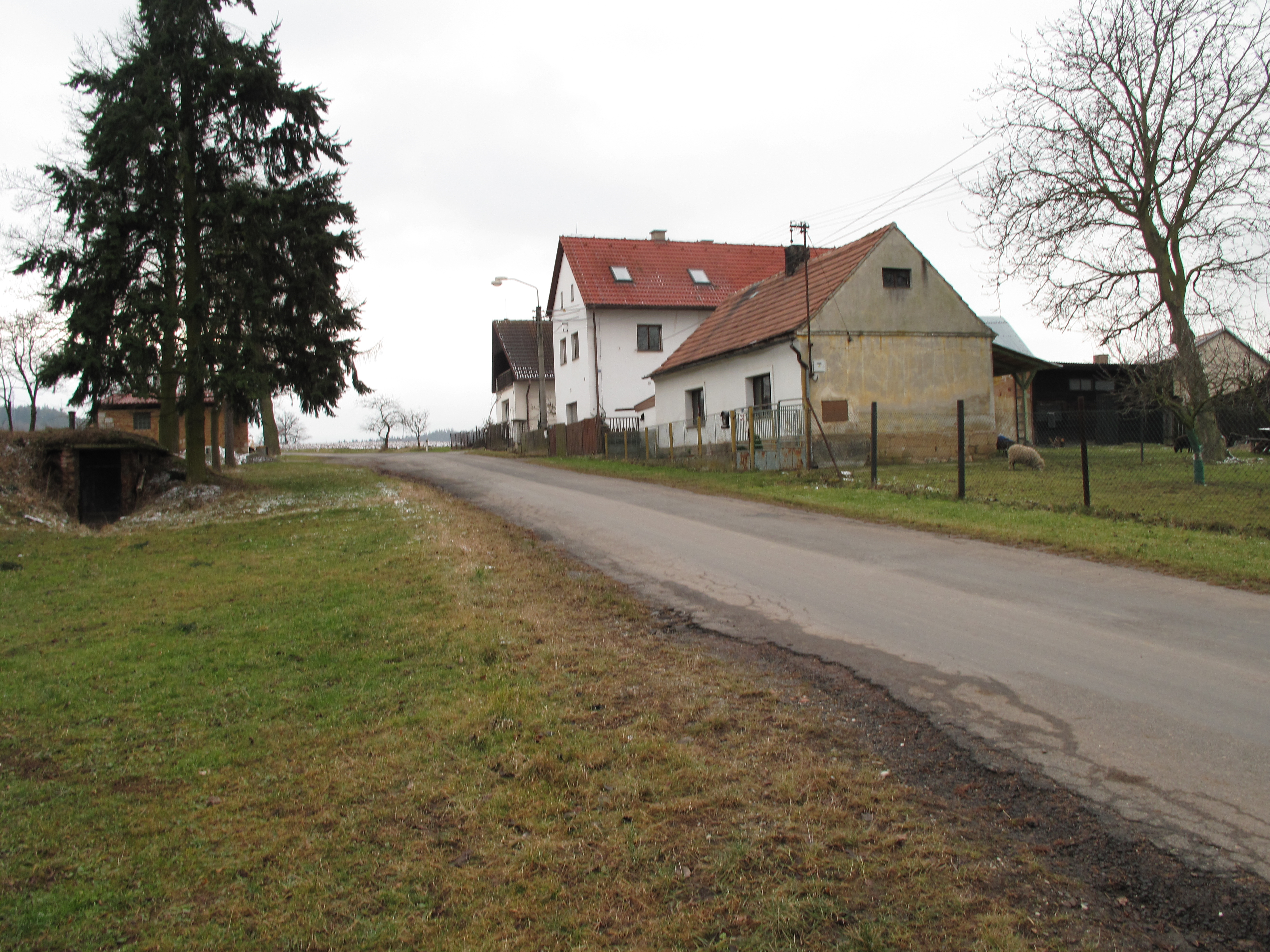 Dům u cesty v Šemnicích. Okres Karlovy Vary, Česká republika.